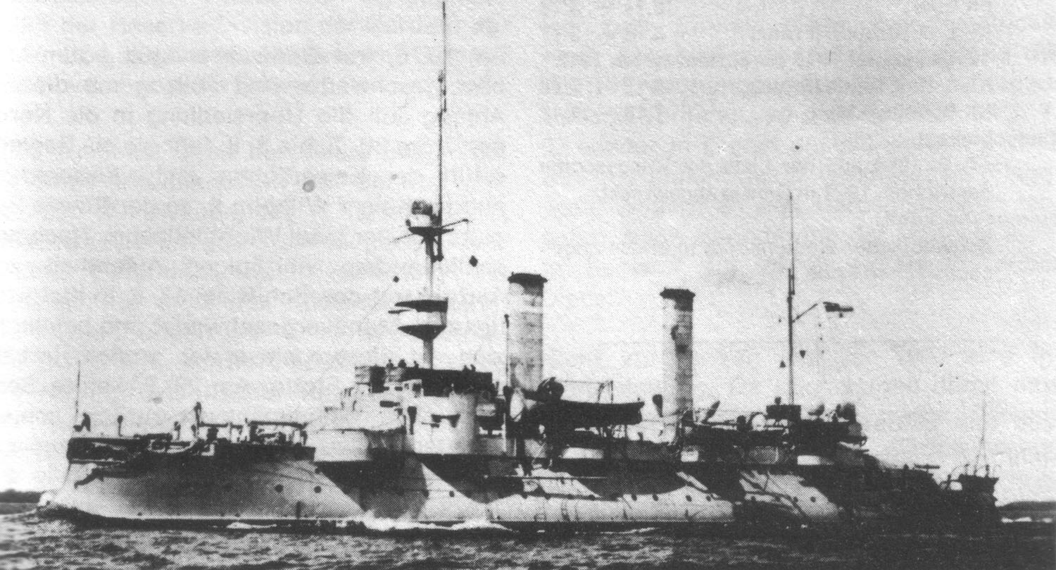 Das deutsche Küstenpanzerschiff SMS Beowulf nach dem 1902 abgeschlossenen Umbau.